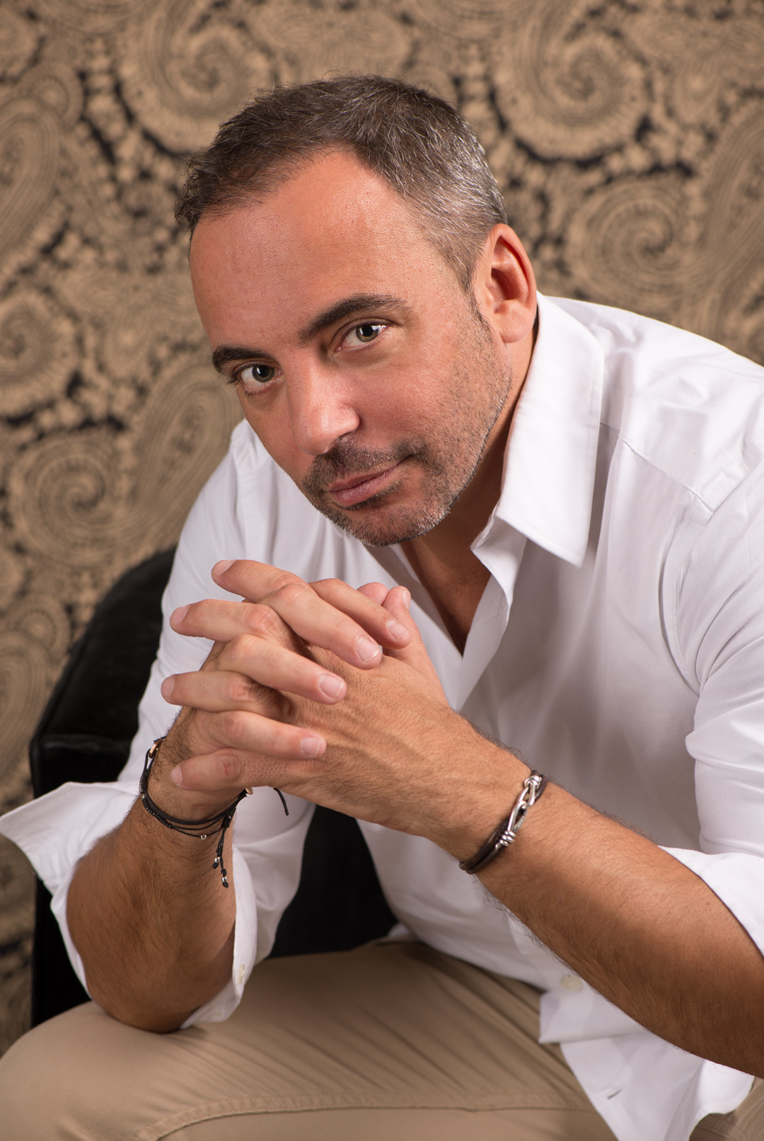 Actualmente vive en Ibiza - España